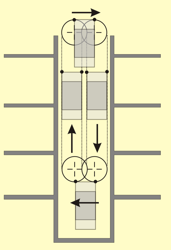 Schematische Darstellung eines Paternosters